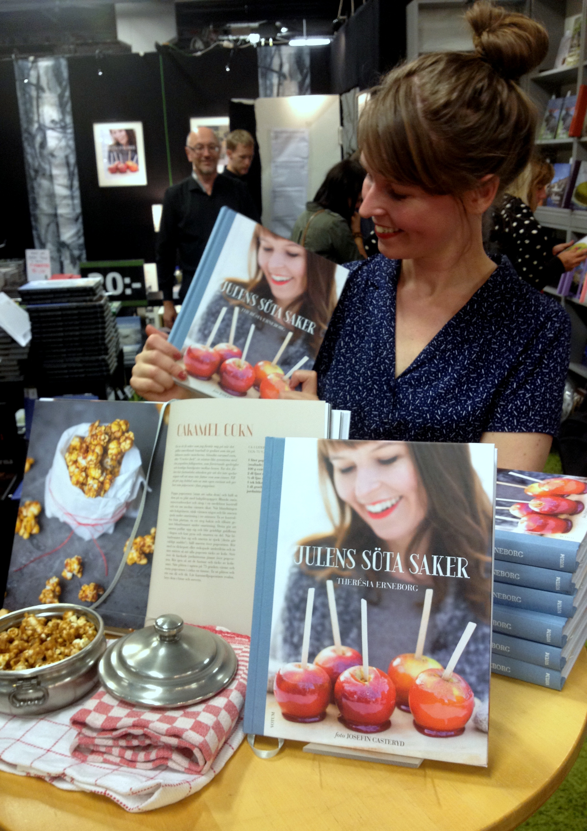 Författare Therésia Erneborg på Bokmässan i Göteborg 2014